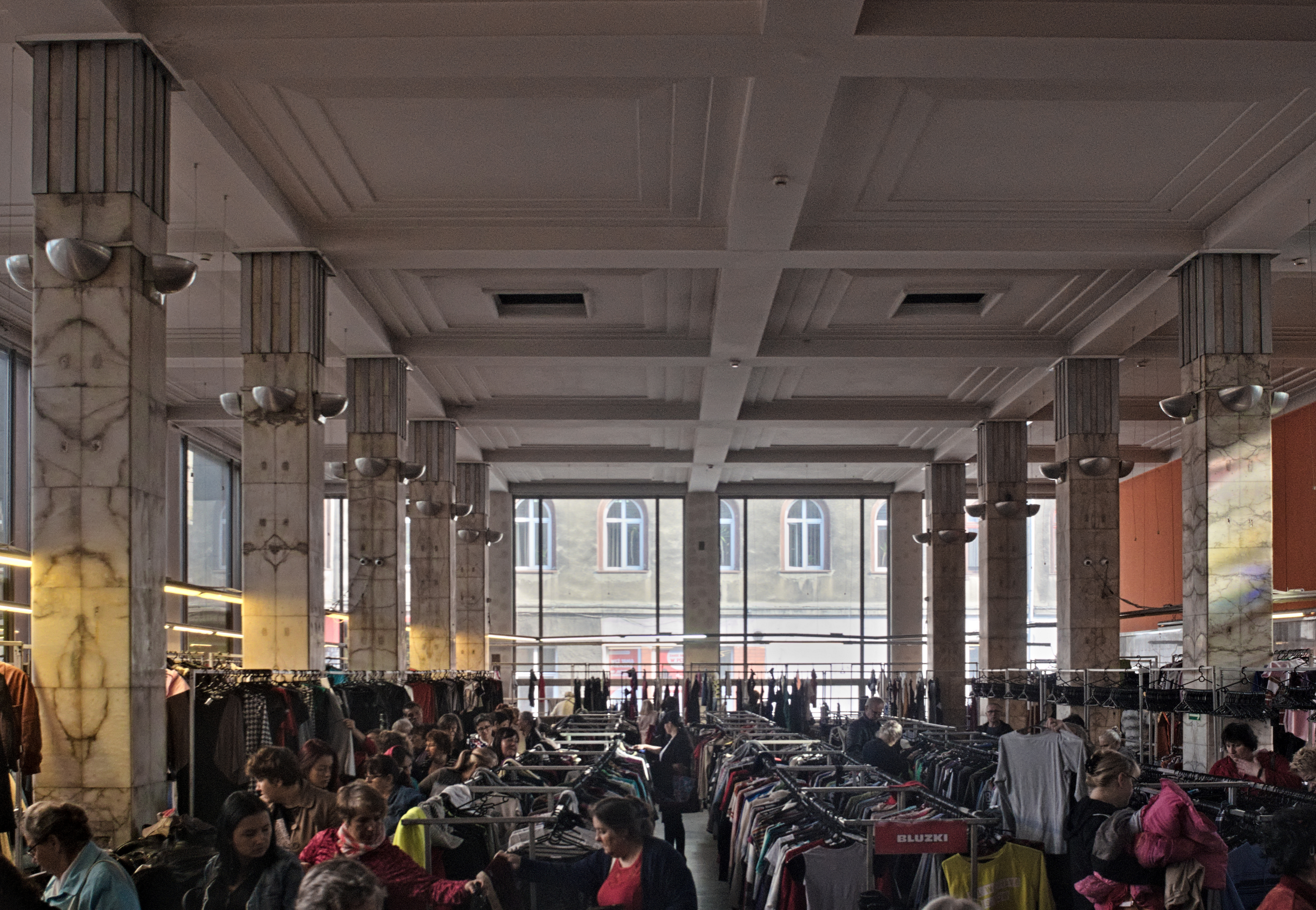 sala na parterze budynku Komunalnej Kasy Oszczędności w Chorzowie, widok z holu, obecnie siedziba sklepu z odzieżą używaną